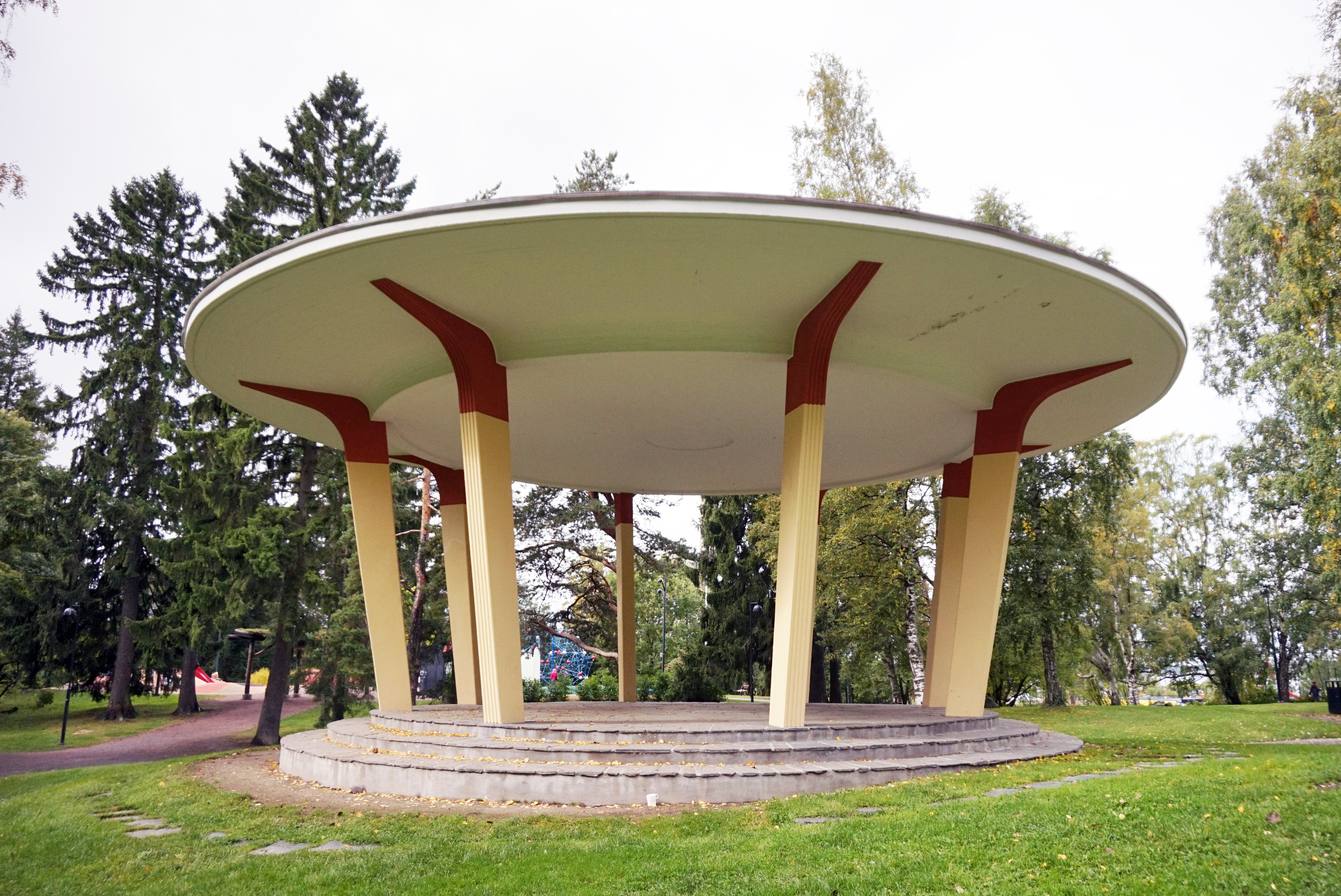 Tammerkosken teollisuusmaisemaa: Näsinpuisto. This is a photo of a monument in Finland identified by the URL 5021